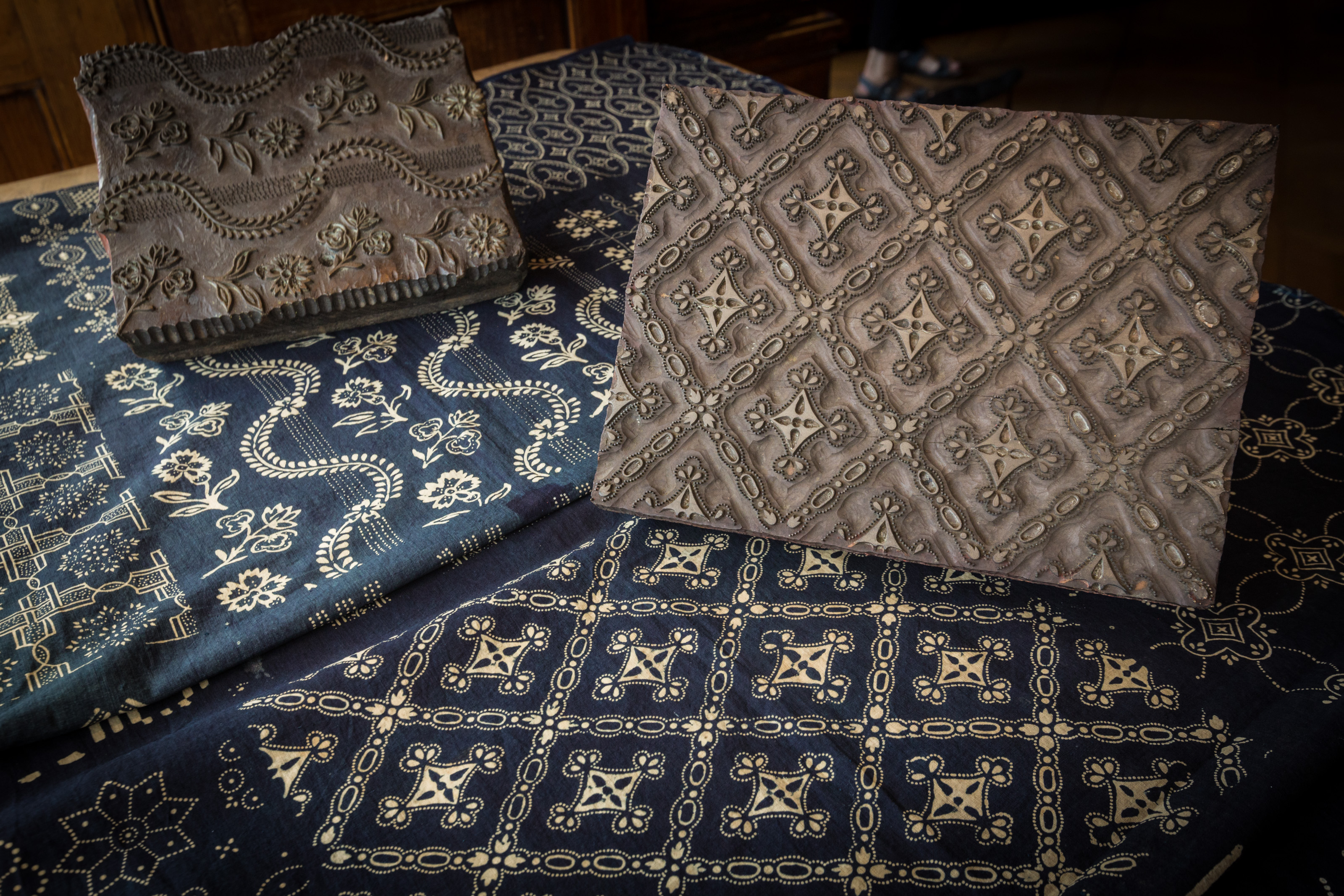 Légende à venir